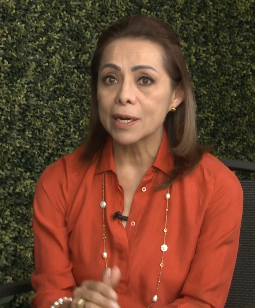 Josefina Vázquez Mota en una entrevista.